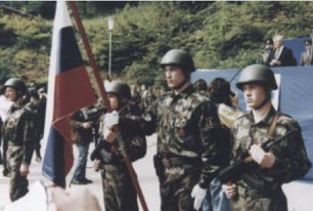 Prisega prvih slovenskih naborniko na Igu v, ki so služili vojaški rok v Teritorialni obrambi.